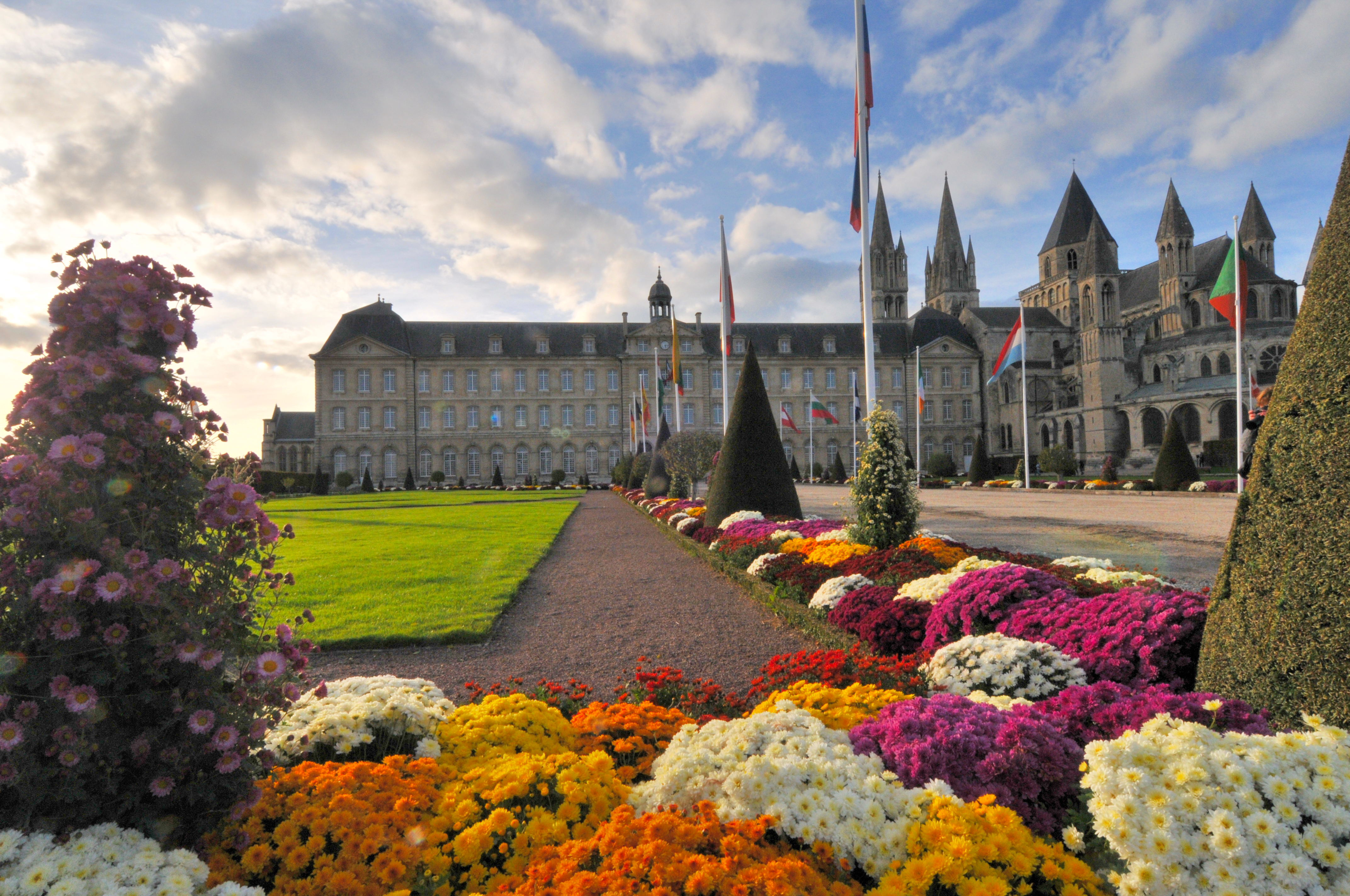 esplanade Jean-Marie Louvel avec au fond l'abbaye aux Hommes à Caen (Calvados, Basse-Normandie).